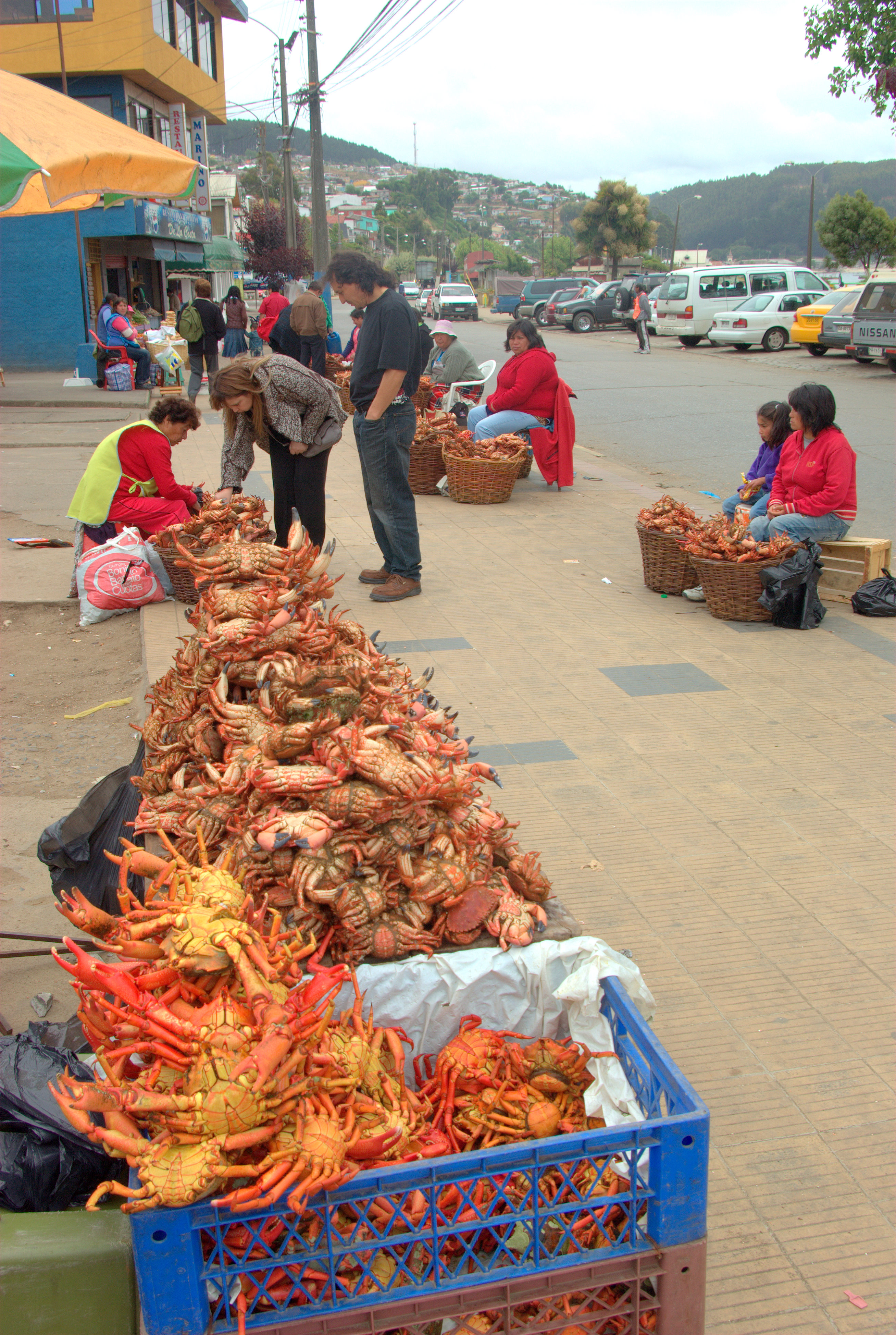 Comercio de jaibas (crustáceos) en la ciudad de Tomé, Chile.